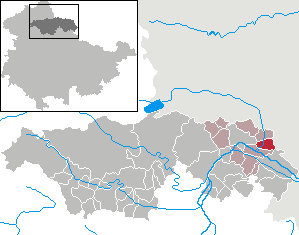 Heygendorf in Thuringia - Kyffhäuserkreis